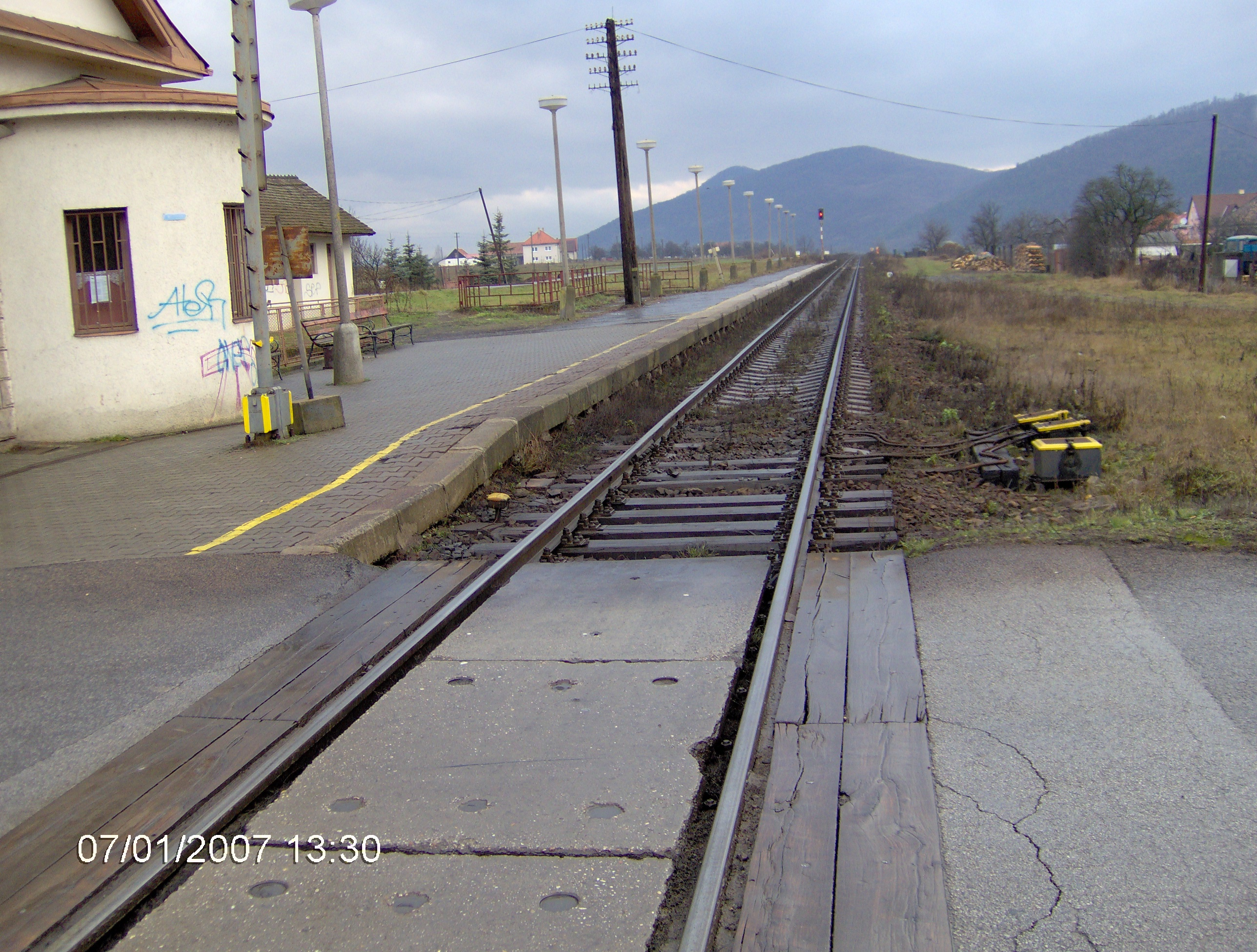 detva,slovačka,zeljeznicki kolodvor